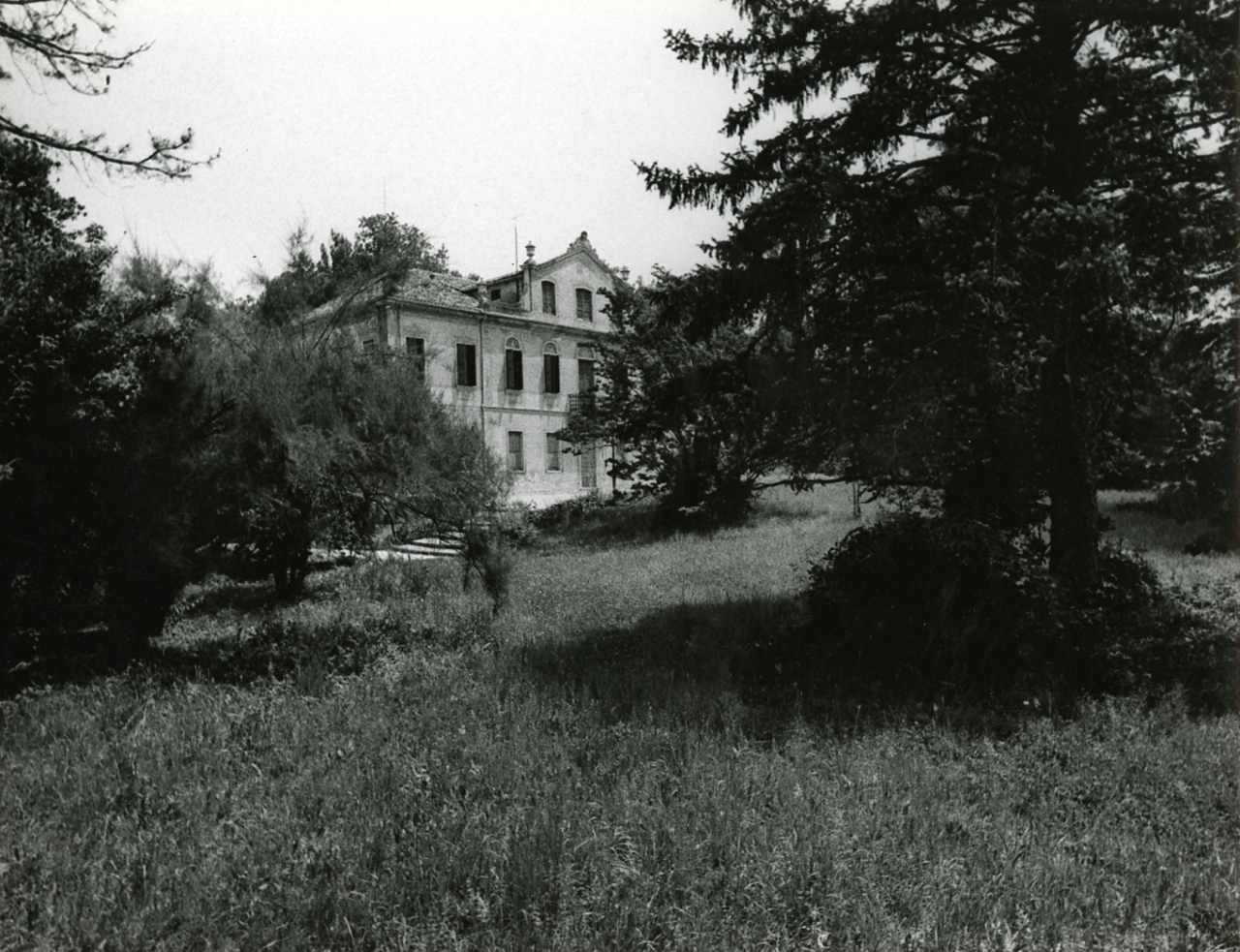 Servizio fotografico : Padova, 1967 / Paolo Monti. - Stampe: 5 : Positivo b/n, gelatina bromuro d'argento/ carta, 18x24, 24x30. - ((Al verso delle stampe manoscritti i numeri dei negativi corrispondenti (formato 35 mm): 393, 395, 398; iscrizioni didascaliche manoscritte a matita: "Via Vitt. Emanuele 2°/ Palazzetto ritenuto/ del Palladio/ ora deposito/ formaggi", "Villa Giusti - Padova", "Giardino Treves", "Casa di Ezzelino", "Casa Broccadello/ Via Vitt. Emanuele 2°"; timbro a inchiostro con copyright: "© - Credit to:/ Paolo Monti/ Via T. Tasso [...]/ Milano [...]". - Sul coperchio della scatola iscrizione didascalica manoscritta a pennarello nero: "Emilia - Bologna". - Occasione: Documentazione per la pubblicazione: Diego Valeri (a cura di), "Padova: i secoli, le ore", Bologna, Edizioni Alfa, 1967. - Fonte: Monografia di Valeri Diego (a cura di): Padova: i secoli, le ore, Bologna, Edizioni Alfa (1967). - Fonte: Agenda di Paolo Monti: Monti/ 3 aprile 1966 - 9 marzo 1971/ 12421-16823 (1966-1971), presso Archivio Paolo Monti